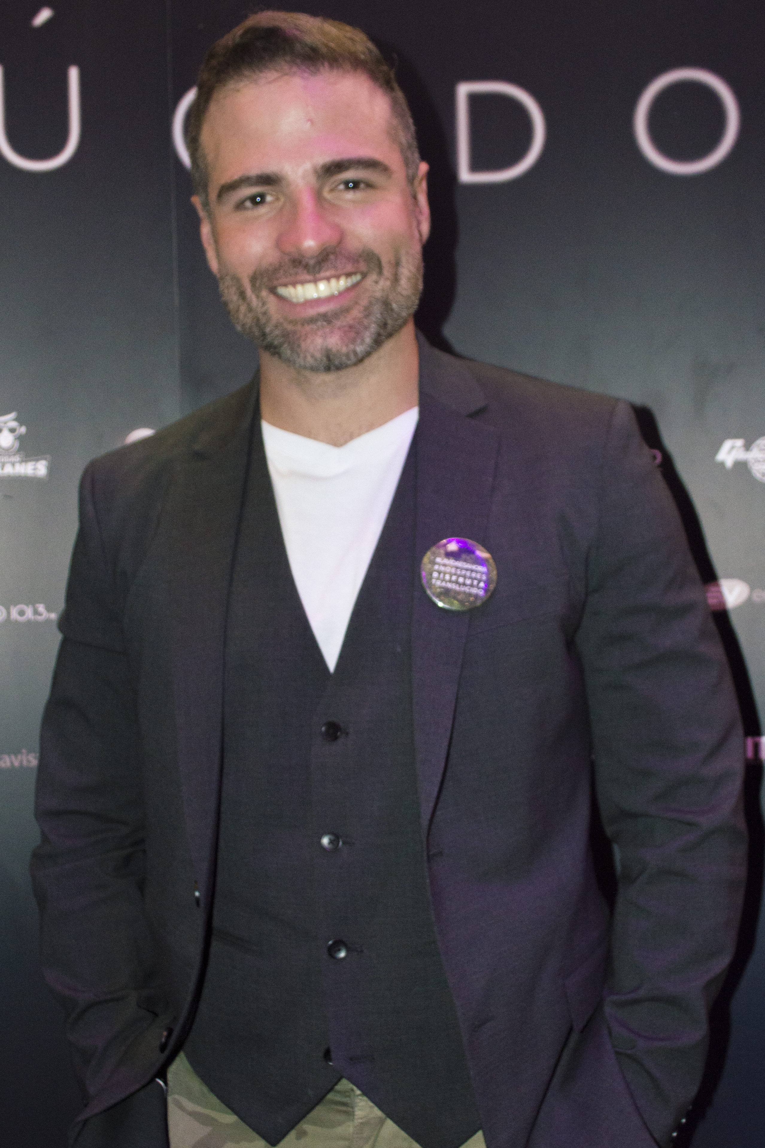 Roberto Manrique en el estreno de la película Translúcido protagonizada por él.